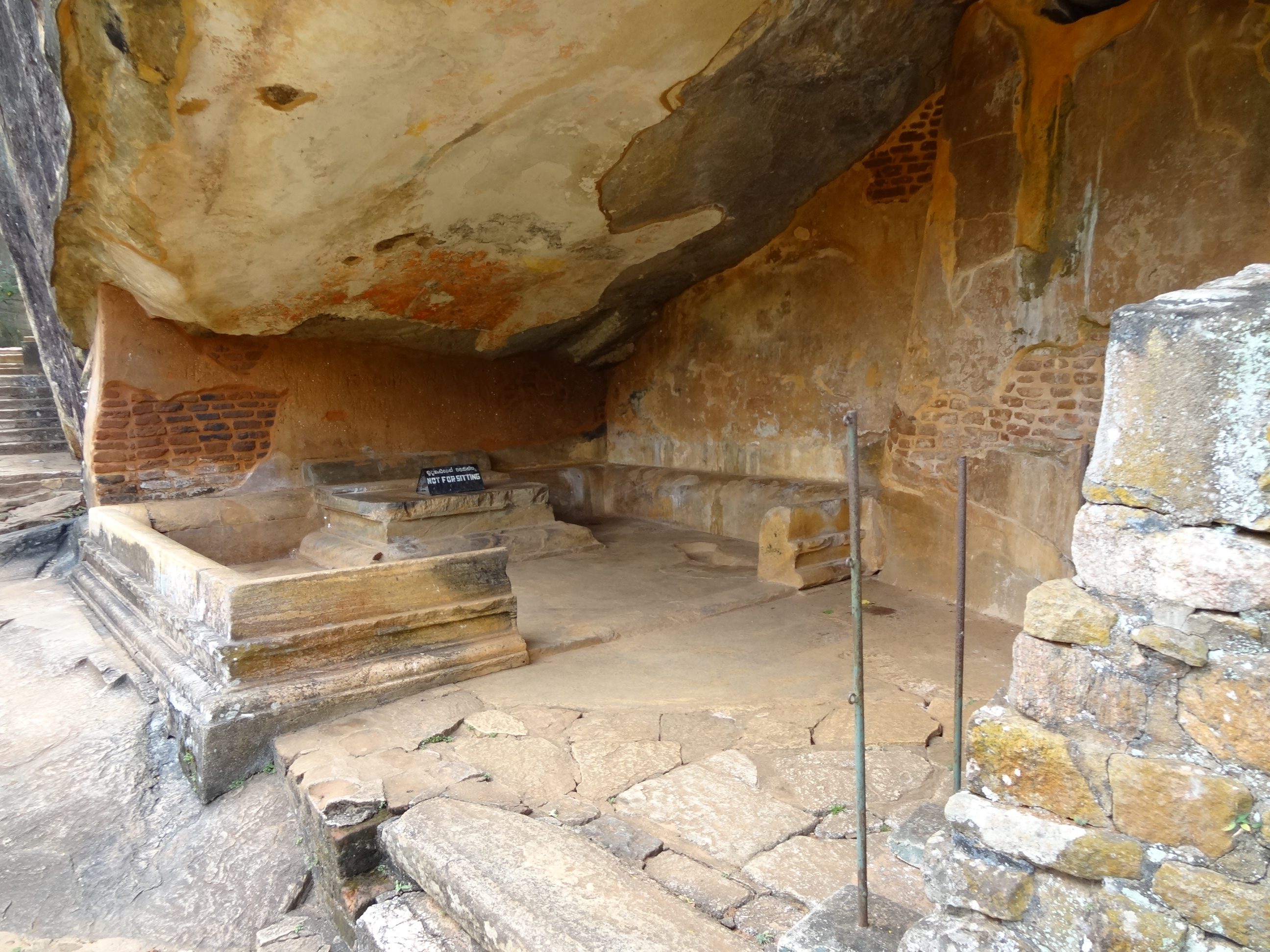 Sigiriya boulder gardens